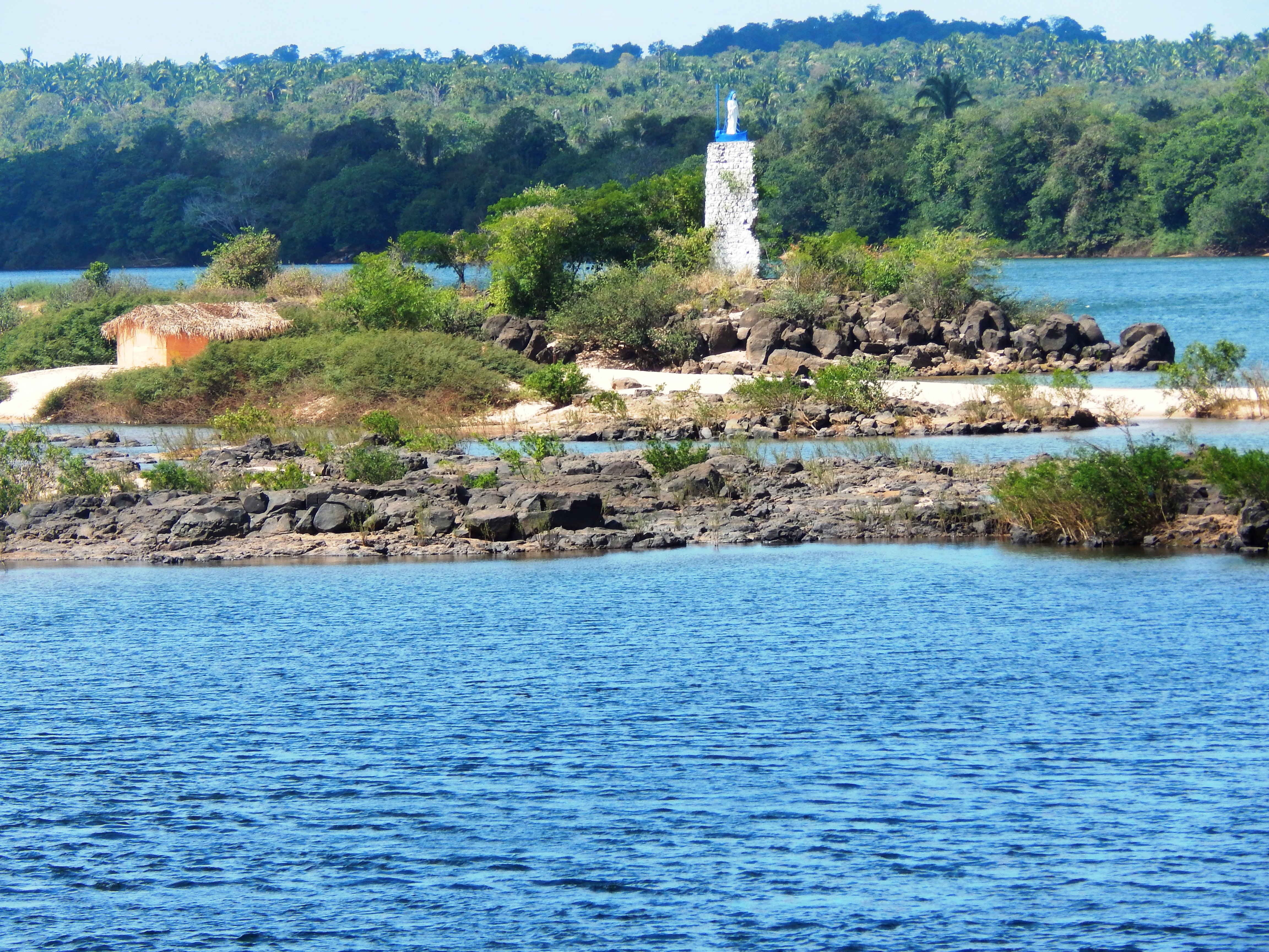 Ilha rochosa localizada no rio Tocantins, entre os municípios de Tocantinópolis-TO e Porto Franco-MA. Seu nome se dá por haver uma estatua de Nossa Senhora dos Navegantes no topo de uma coluna de pedras no meio da ilha.